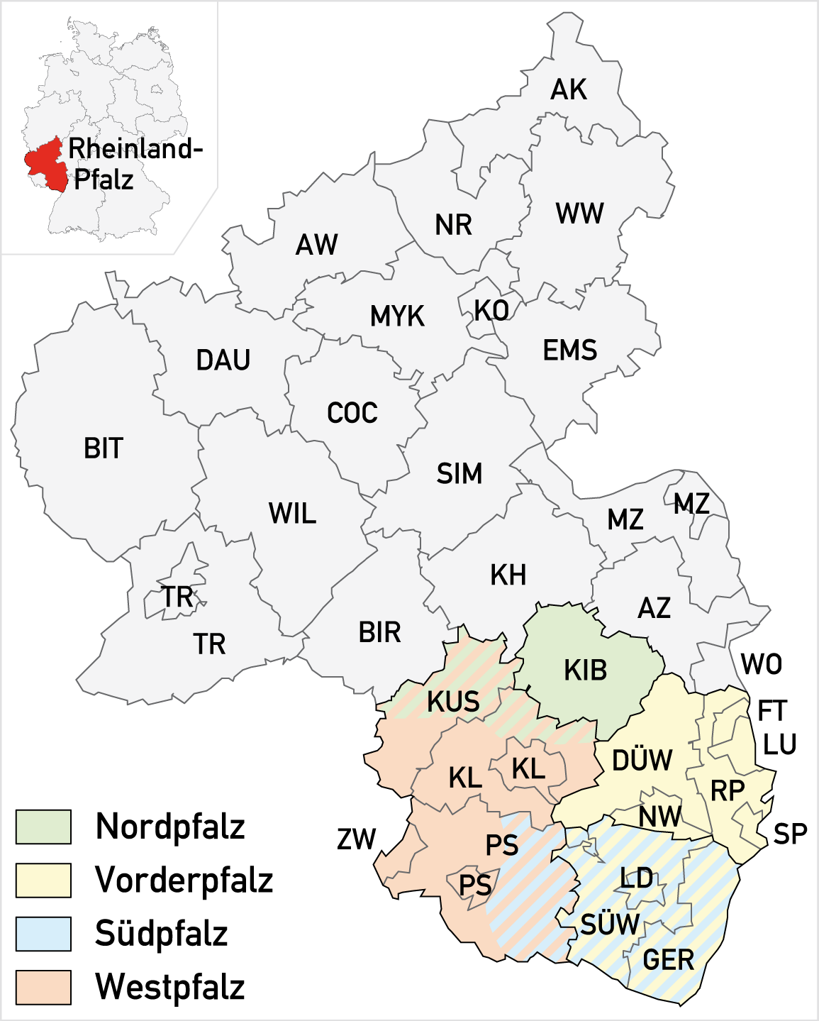 Karte der Teilbereiche der Pfalz Nordpfalz Donnersbergkreis (Kfz-Kennzeichen KIB, Verwaltungssitz Kirchheimbolanden), ist 1969 durch Zusammenlegung der vorherigen Kreise Kirchheimbolanden und Rockenhausen entstanden Vorderpfalz Landkreis Bad Dürkheim (DÜW) Stadt Frankenthal (Pfalz) (FT) Stadt Ludwigshafen am Rhein (LU) Stadt Neustadt an der Weinstraße (NW) Rhein-Pfalz-Kreis (RP, Verwaltungssitz: Ludwigshafen) Stadt Speyer (SP) Südpfalz Landkreis Germersheim (GER) Stadt Landau in der Pfalz (LD) Landkreis Südliche Weinstraße (SÜW, Verwaltungssitz: Landau) Westpfalz (Hinterpfalz) Landkreis Kaiserslautern (KL, Verwaltungssitz Kaiserslautern) Stadt Kaiserslautern (KL) Landkreis Kusel (KUS) Stadt Pirmasens (PS) Landkreis Südwestpfalz (PS, Verwaltungssitz: Pirmasens) Stadt Zweibrücken (ZW) Übriges Rheinland-Pfalz Landkreis Ahrweiler (AW) Landkreis Altenkirchen (AK) Landkreis Alzey-Worms (AZ, Verwaltungssitz: Alzey) Landkreis Bad Kreuznach (KH) Landkreis Bernkastel-Wittlich (WIL, Verwaltungssitz: Wittlich) Landkreis Birkenfeld (BIR) Landkreis Cochem-Zell (COC, Verwaltungssitz: Cochem) Eifelkreis Bitburg-Prüm (BIT, Verwaltungssitz: Bitburg) Stadt Koblenz (KO) Stadt Mainz (MZ) Landkreis Mainz-Bingen (MZ, Verwaltungssitz: Ingelheim am Rhein) Landkreis Mayen-Koblenz (MYK, Verwaltungssitz: Koblenz) Landkreis Neuwied (NR) Rhein-Hunsrück-Kreis (SIM, Verwaltungssitz: Simmen/Hunsrück) Rhein-Lahn-Kreis (EMS, Verwaltungssitz: Bad Ems) Stadt Trier (TR) Landkreis Trier-Saarburg (TR) Landkreis Vulkaneifel (DAU, Verwaltungssitz: Daun) Westerwaldkreis (WW, Verwaltungssitz: Montabaur) Stadt Worms (WO)